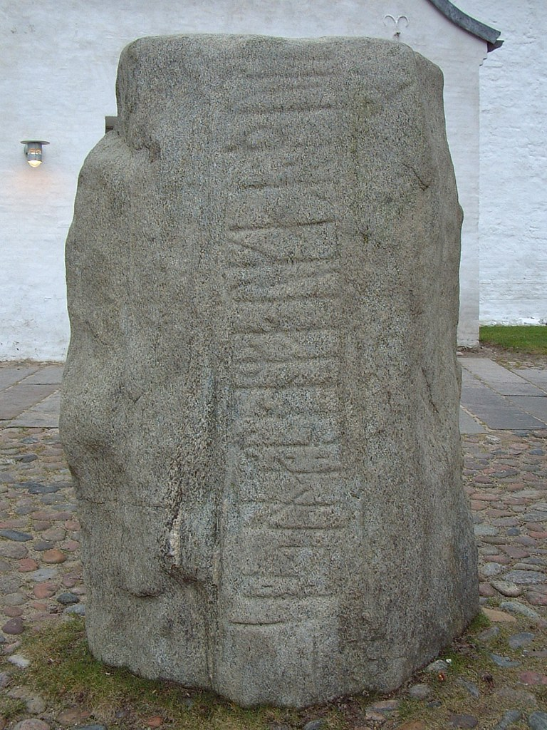 Kleiner und älterer Runenstein von Jelling mit der Aufschrift: "König Gorm errichtete diesen Gedenkstein zu Ehren seiner Frau Thyra, Erneuerer/Stolz Dänemarks."